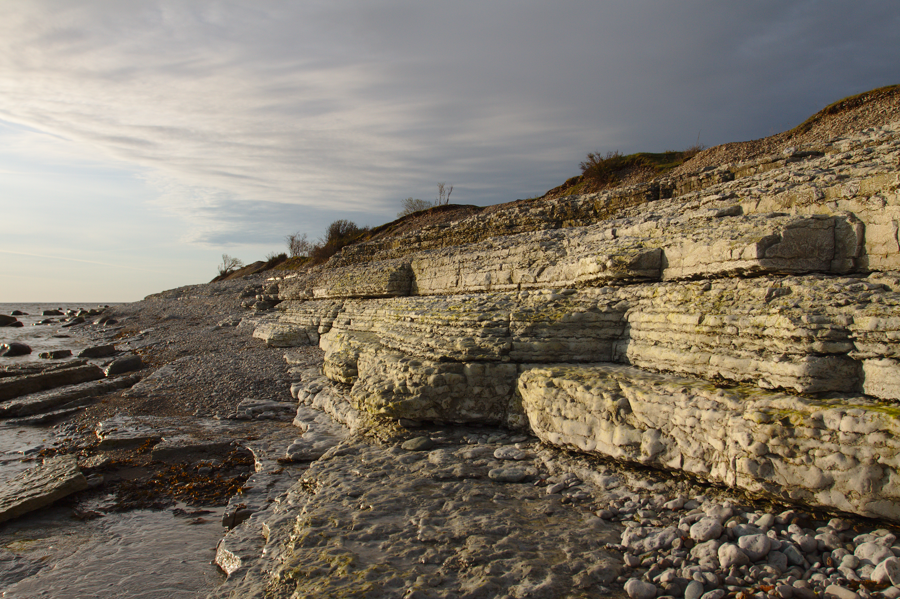 Pankrannik. Aluspõhjakivimid paljanduvad astmeliselt. Aluspõhjakivimeid katab kiviklibu. Osmussaare maastikukaitseala